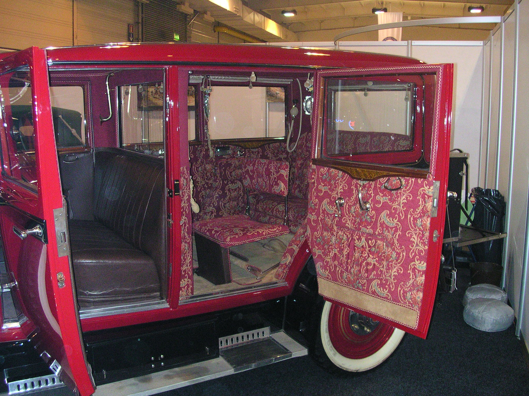 Essen, Technoclassica 2005. Praga Grand, Baujahr 1929, 8-Zylinder-Motor, Hubraum 3580 cm³, 51 kW (70 PS), vmax 110 km/h